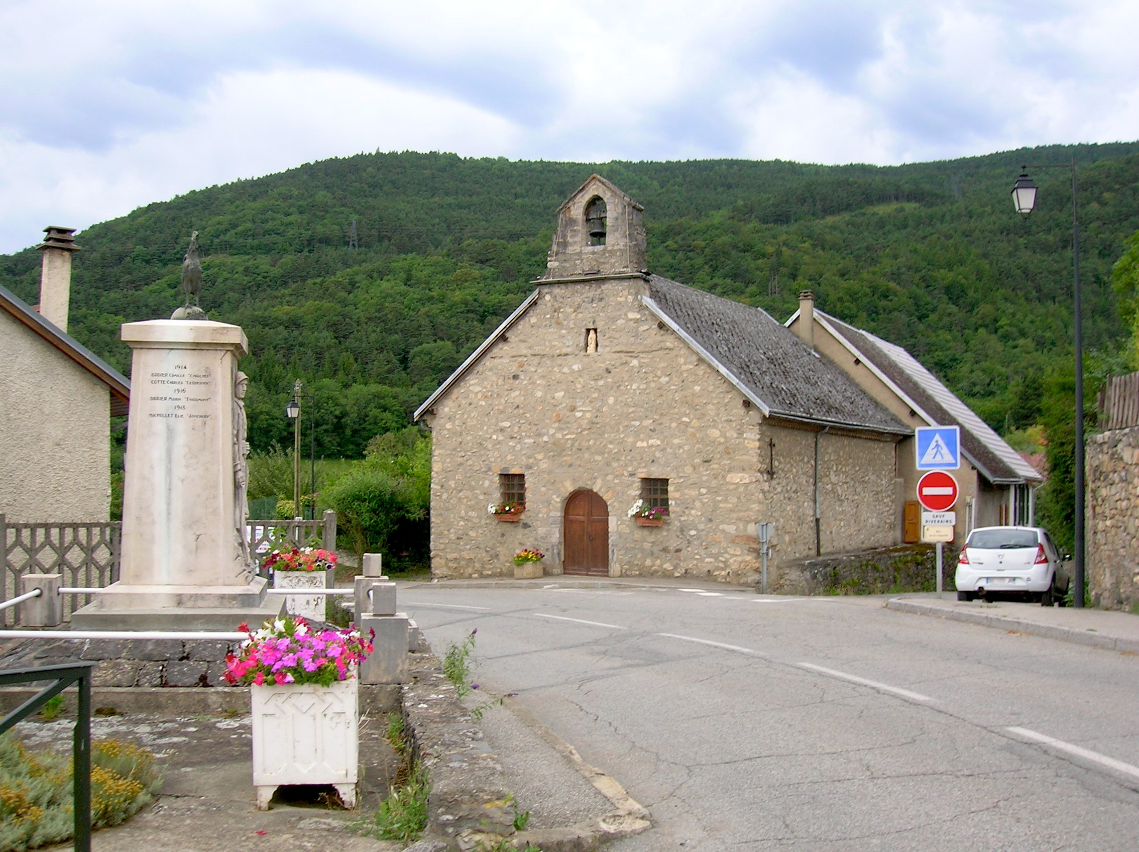 Prunières (Isère), France.